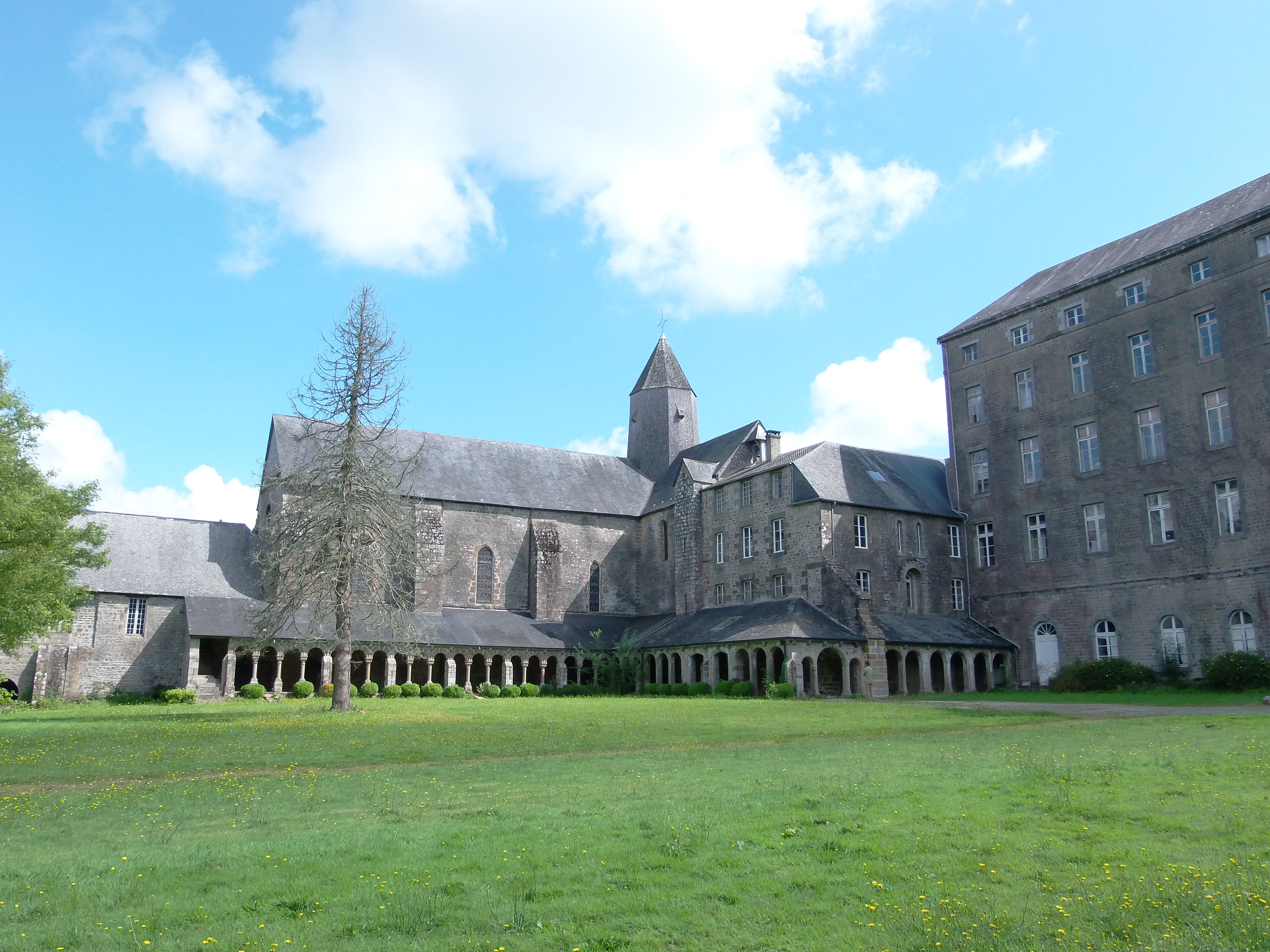 Vue de l'Abbaye Blanche de Mortain